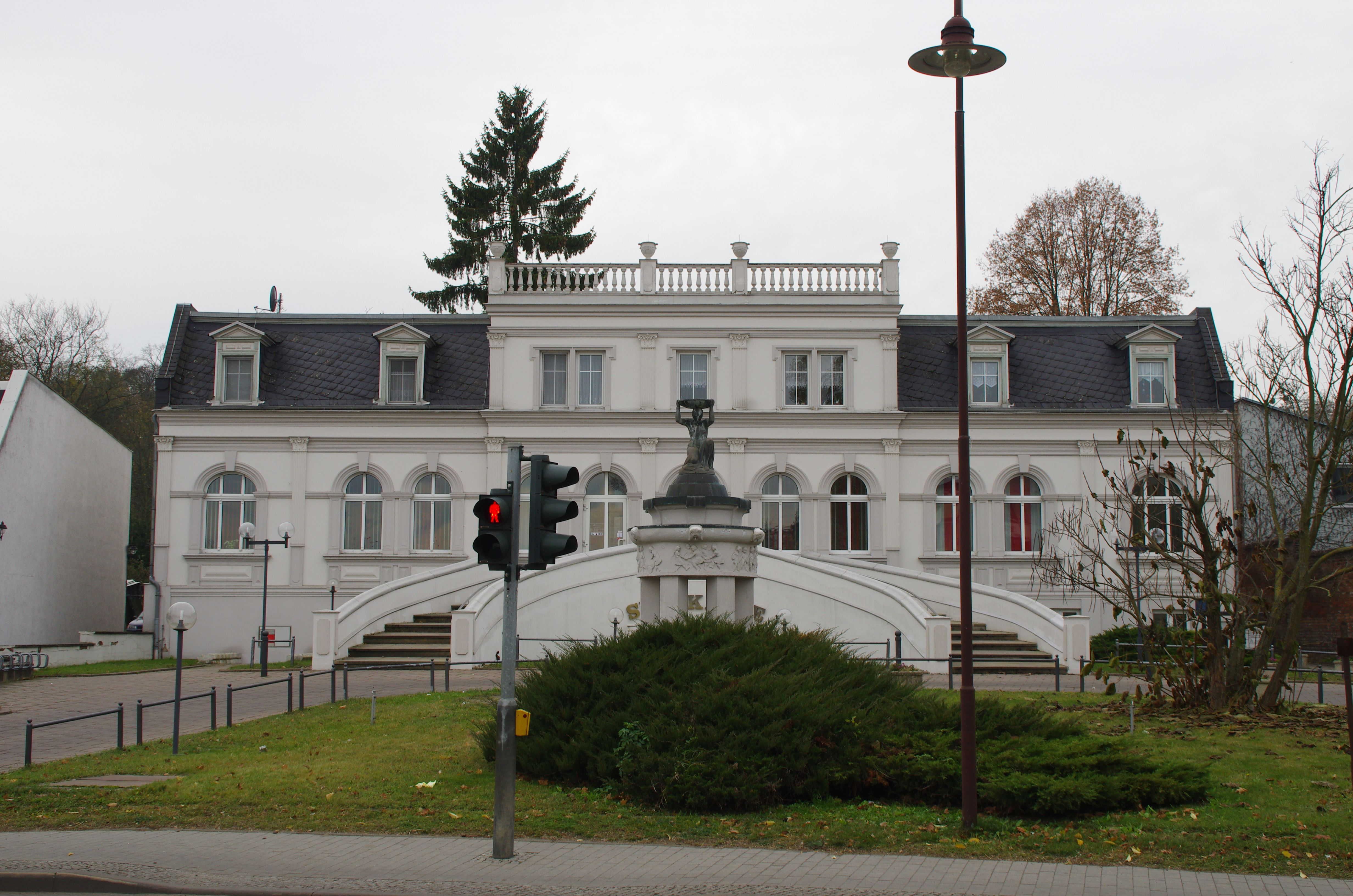 Wriezen in Brandenburg. Das Landhaus ist heute die Sparkasse. Die Adresse ist Frankfurter Straße 2. Vor dem Haus befindet sich der Ellingerbrunnen. Das Landhaus wurde 1781 erbaut.